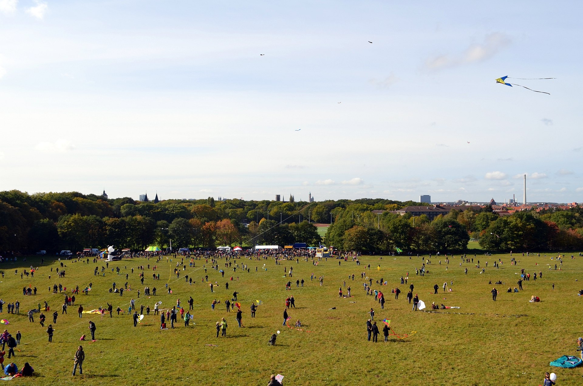 Braunschweig: Franzsches Feld, Blick von der Aussichtsplattform des ehemaligen Bunkers des Kreisbefehlsstandes Richtung Westen auf die Innenstadt.